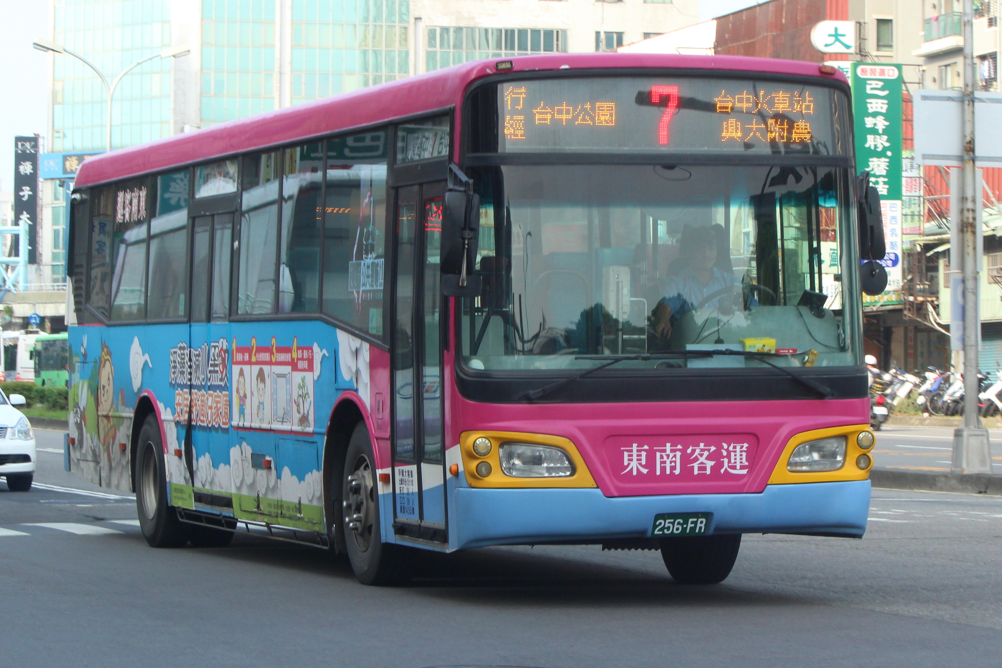 東南客運256-FR行駛台中市公車7路